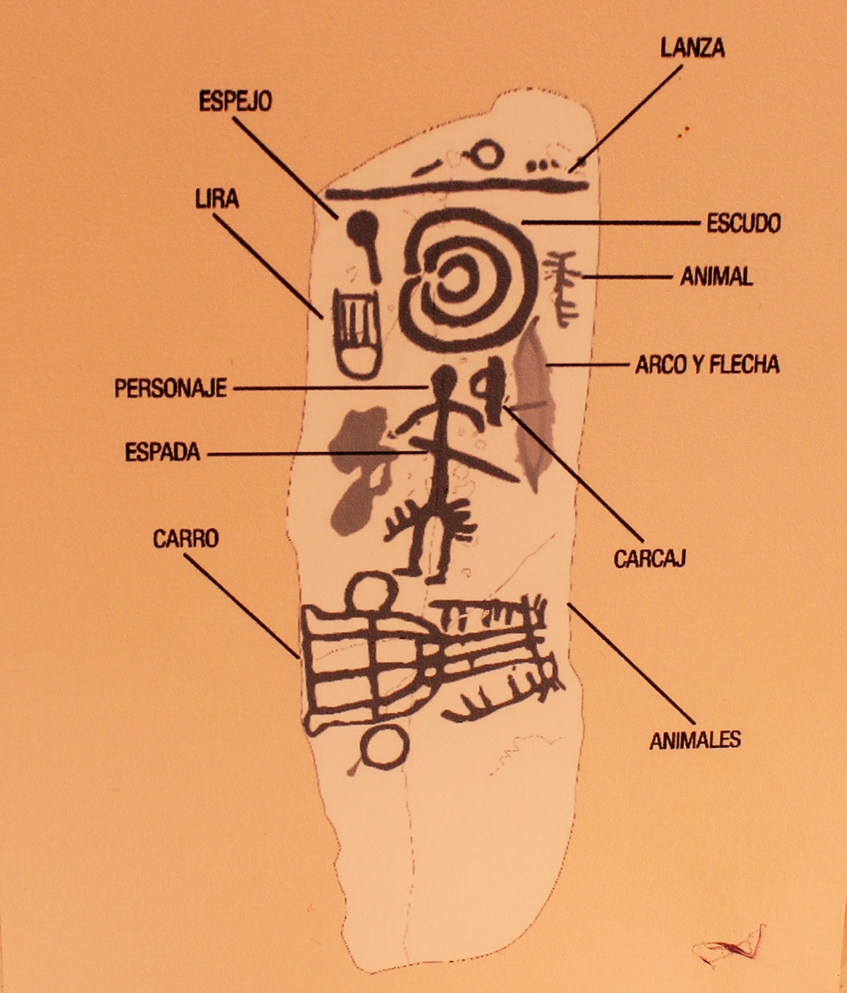 Esquema estela de guerrero. Siglo VII-VI a.C Los Llanos, Zarza Capilla, Badajoz